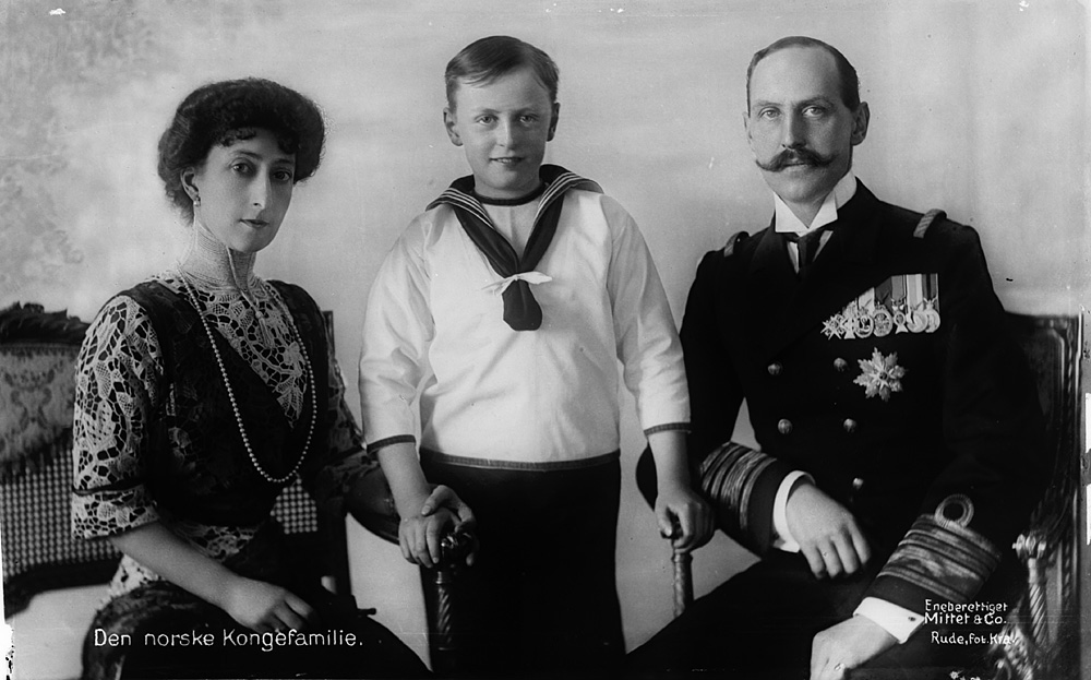 Fotograf: Kunstforlaget Mittet & Co. A/S År: Ukjent Sted: Kristiania/Oslo/Norway Arkivreferanse: Riksarkivet, PA 1296, EA4612_63 Beskrivelse: "Den norske Kongefamilie." Dronning Maud, kronprins Olav og kong Haakon. Url